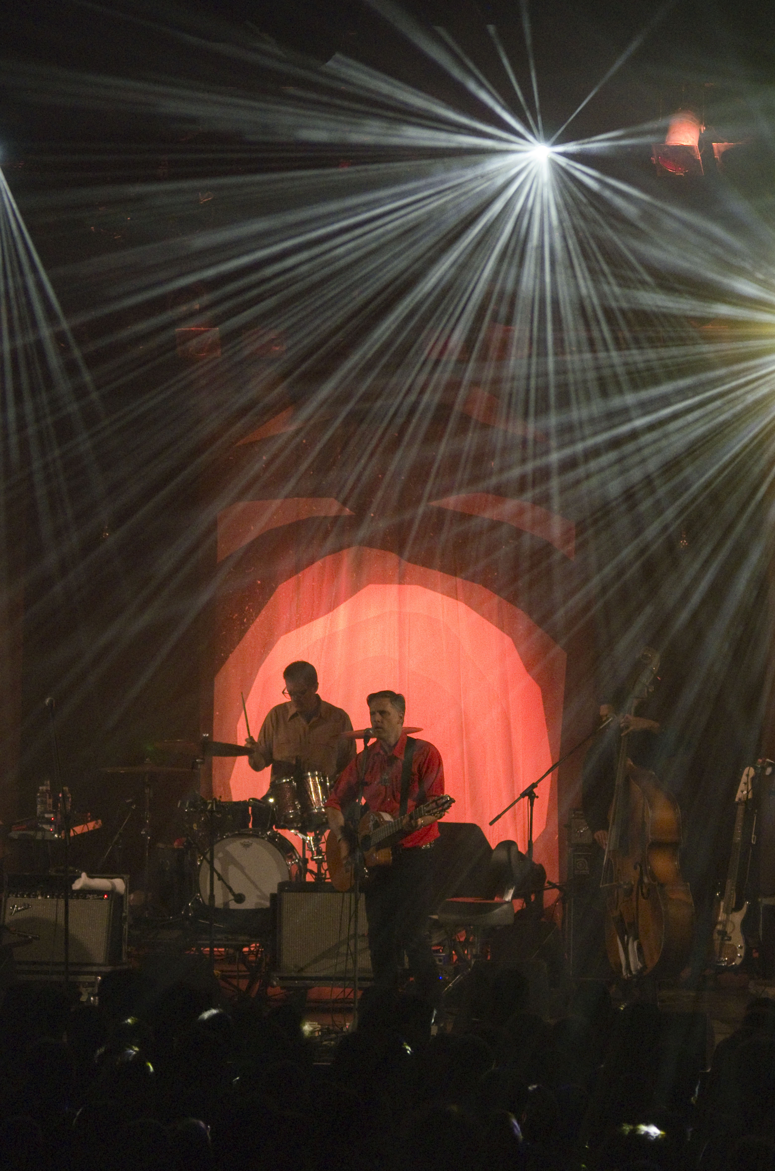 Das Zelt-Musik-Festival 2016 in Freiburg im Breisgau 13.07.2016 Calexico